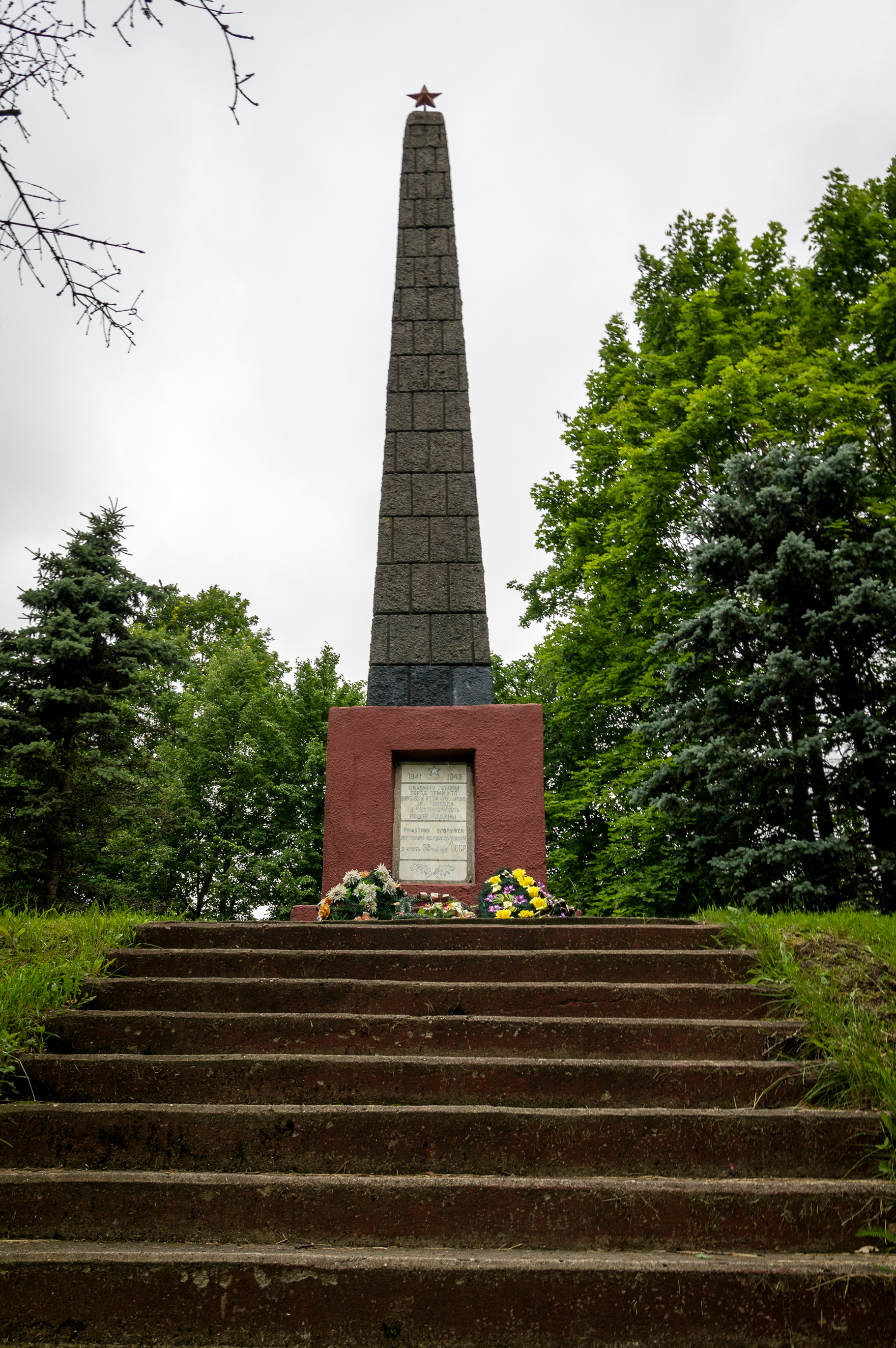 На ўшанаванне памяці 31 земляка, якія загінулі ў час Другой сусветнай вайны, у 1972 годзе пастаўлены абеліск.